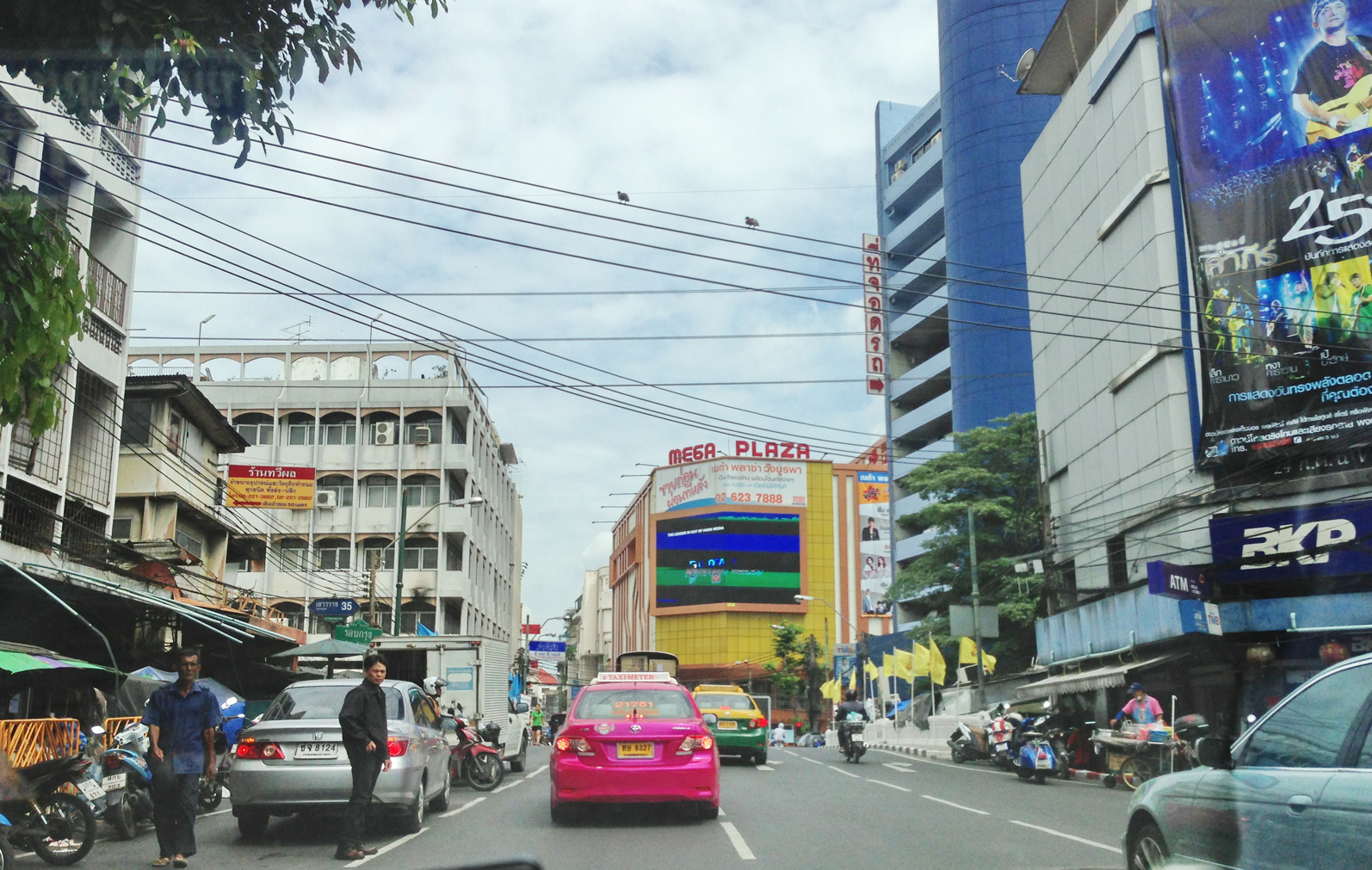 Yaowarat,Samphanthawong,Bangkok